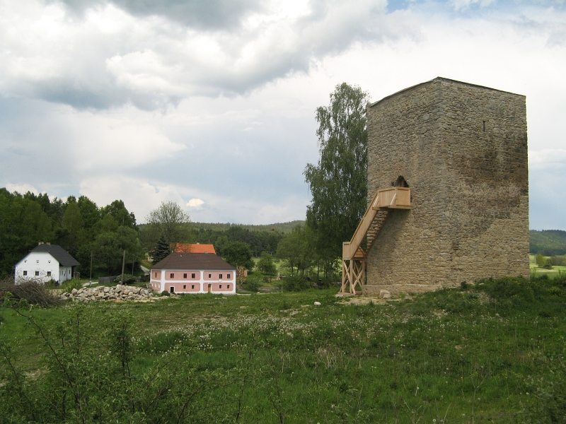 Tvrz, Tichá